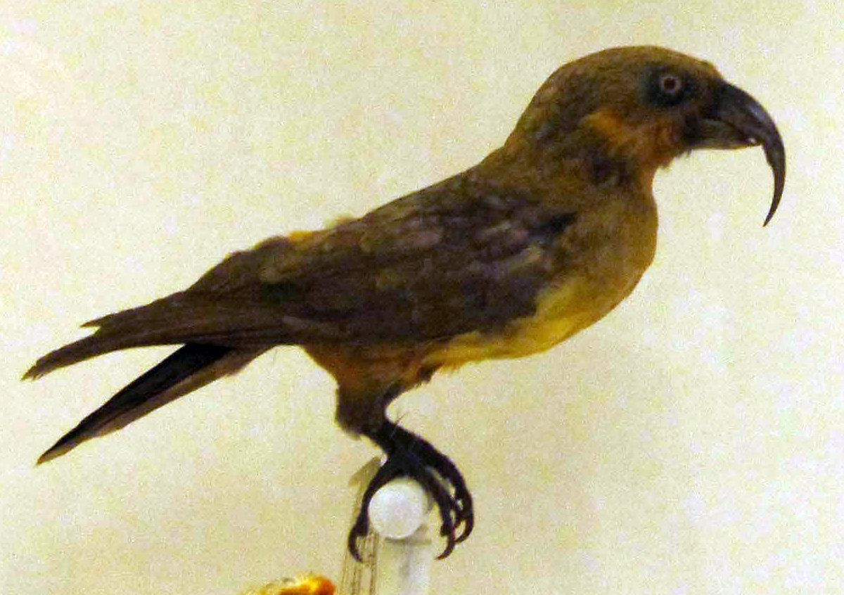 La Specola - Nestor productus